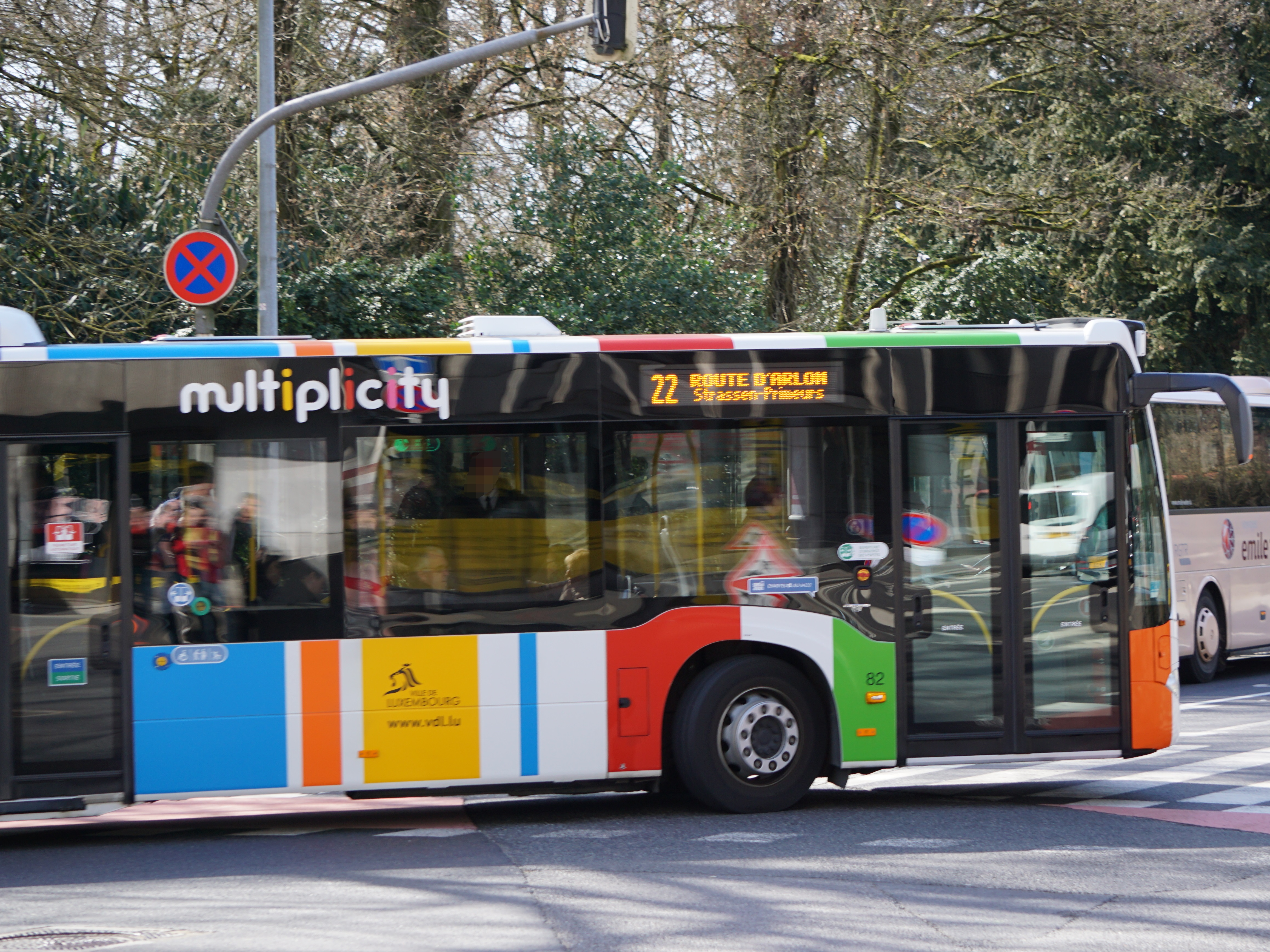 Bus AVL (Autobus de la Ville de Luxembourg) #82. Marque: Mercedes Fiert vum Bd du Prince Henri an d'Av. Emile Reuter op der Linn 22 a Richtung Stroossen.